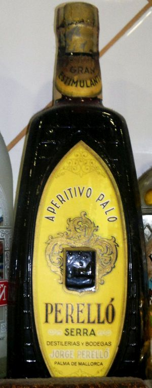 Ampolla dels anys 1960 de Palo de Destileries Perelló, avui desaparegudes. El palo (de l'escorça de la quina, coneguda com a palo quina) és una beguda alcohòlica típica de Mallorca obtinguda per maceració o infusió d'escorça de quina (Cinchona sp) i d'arrels de genciana (Gentiana lutea), amb sucre, sacarosa caramelitzada, i alcohol etílic.